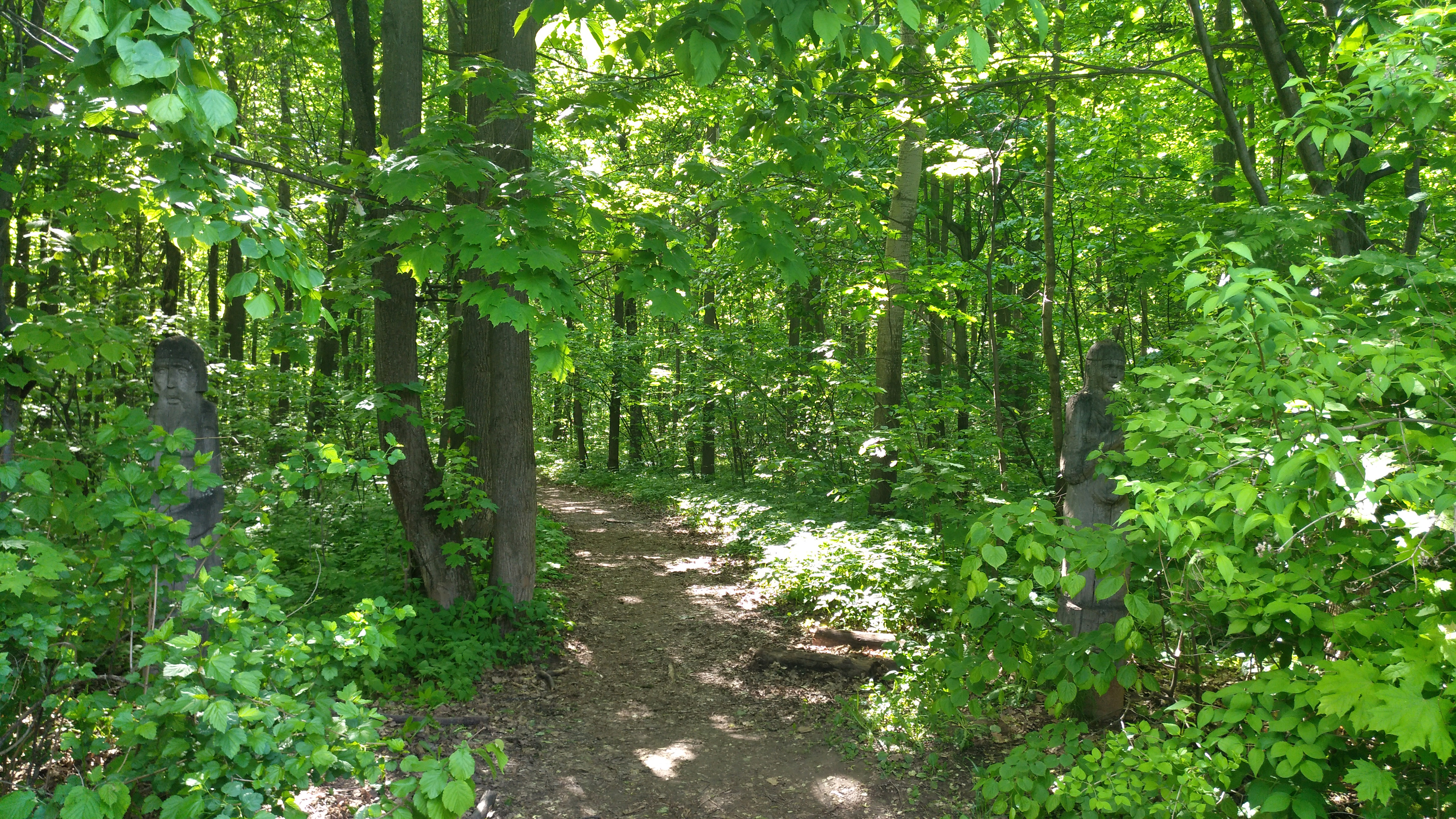 Чебоксарский филиал Главного ботанического сада им. Н.В. Цицина: Расположен вдоль речки Кукшумка в г. Чебоксары; вход в ботанический сад — со стороны проспекта И. Яковлева, Чебоксары, Чувашия This image is related to the protected area of Russia number 2100057